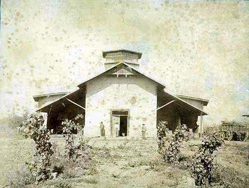 Bodega San Carlos, hacia el 1900